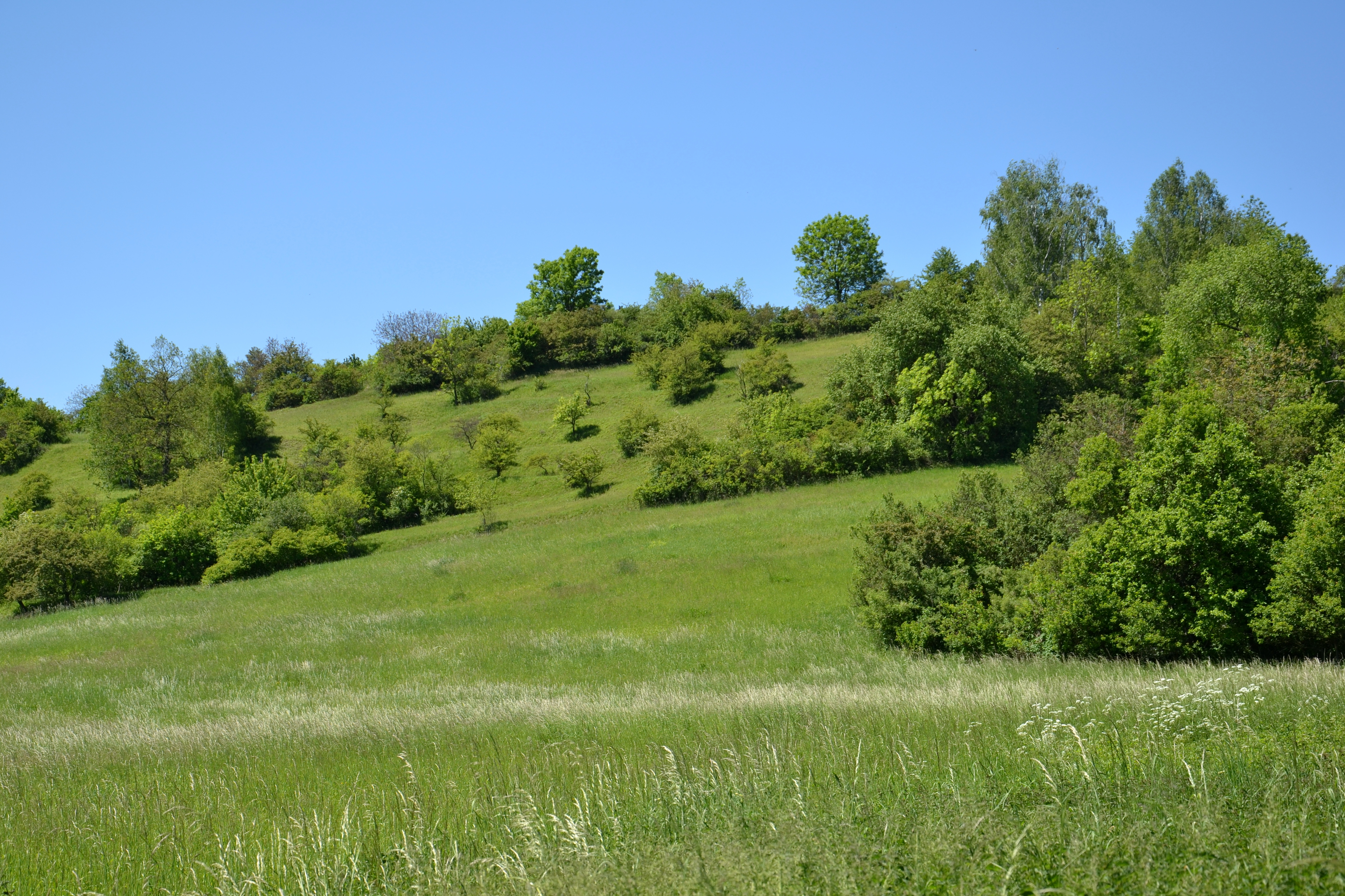 Stráně u Drahobuzi – celkový pohled na západní část chráněného území